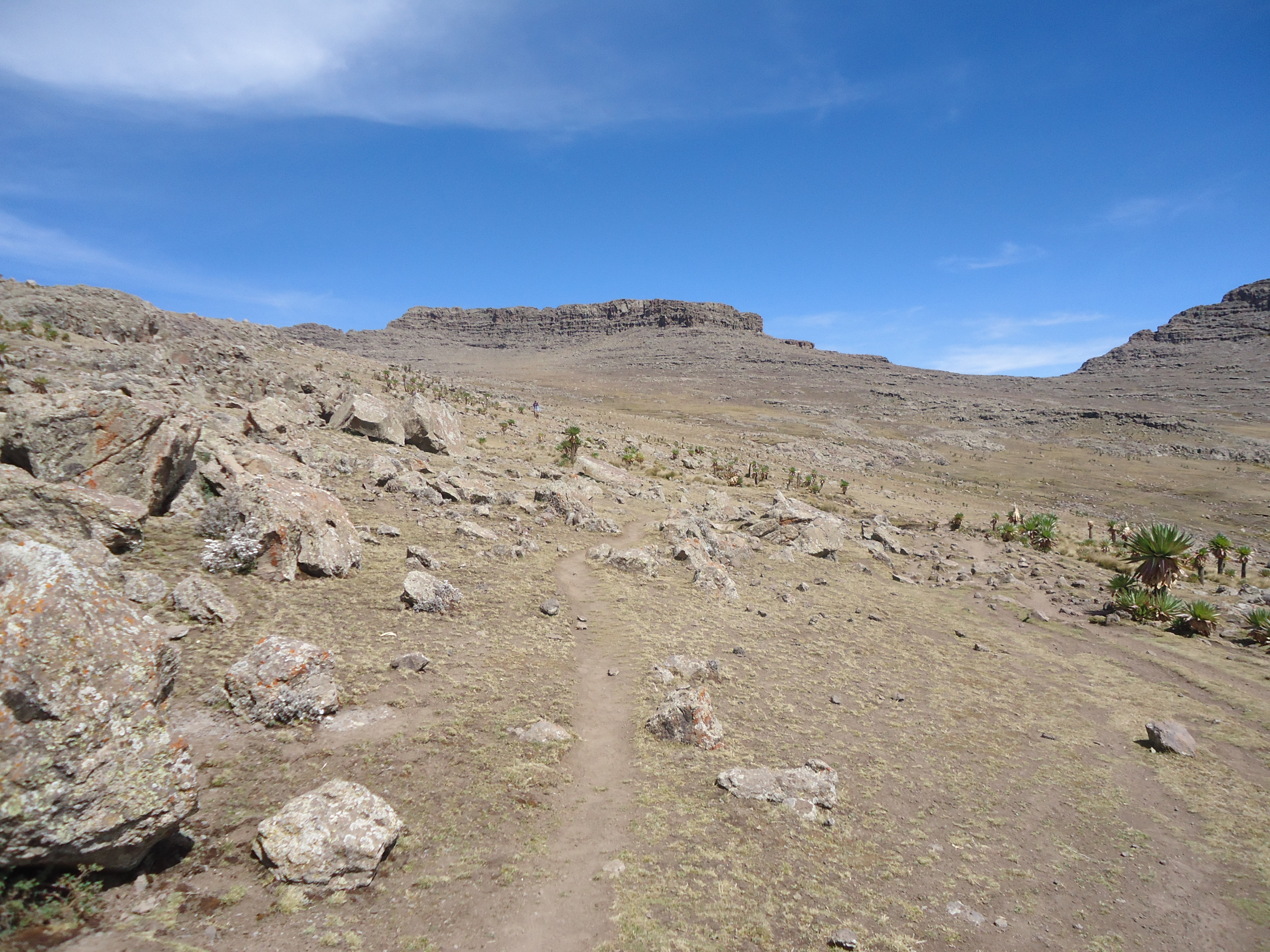 Gipfelaufbau des Ras Dejen